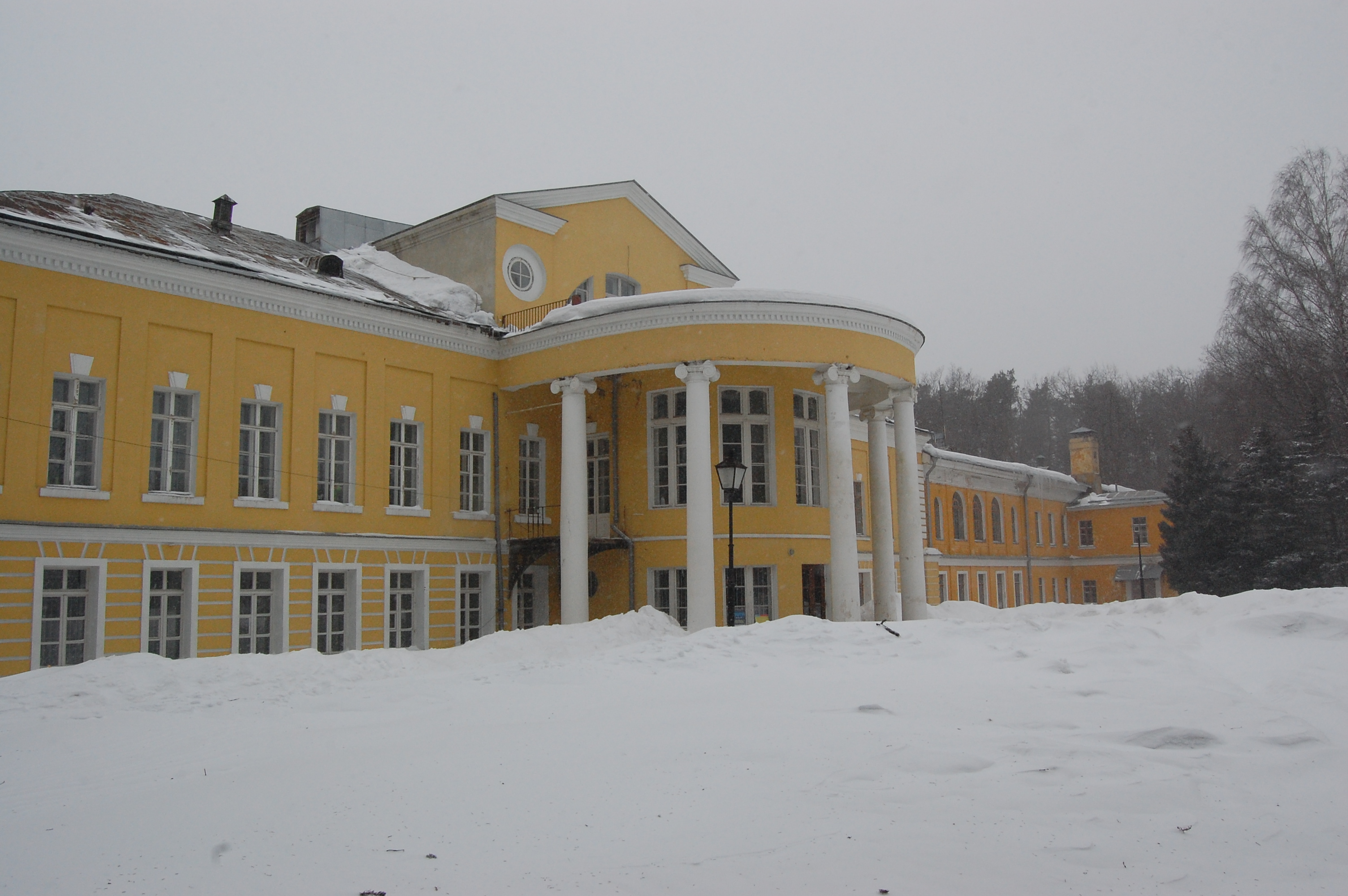 Главный дом